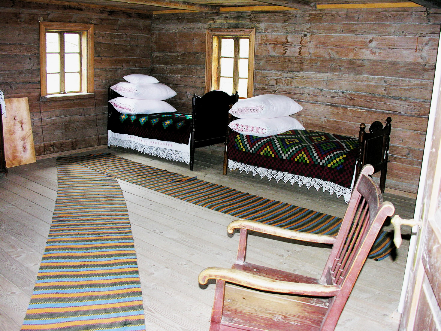 Stuba, vidus 2007 m. balandžio 21 d., Lietuva